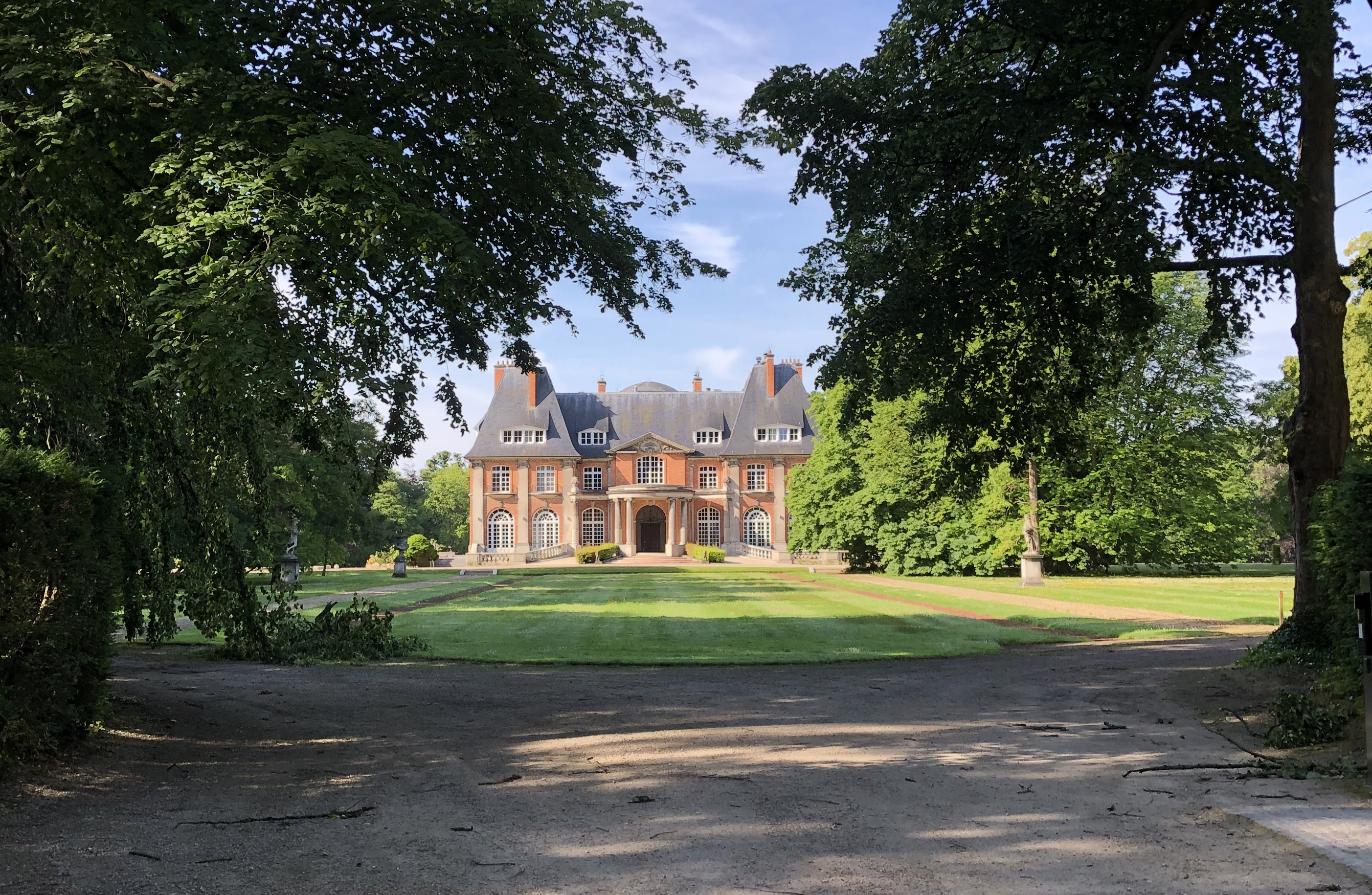 Castle "La Fougeraie"